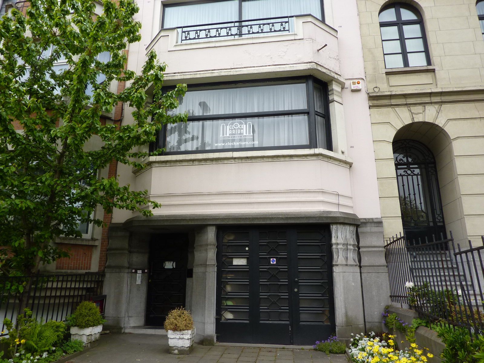 Musée du Clockarium